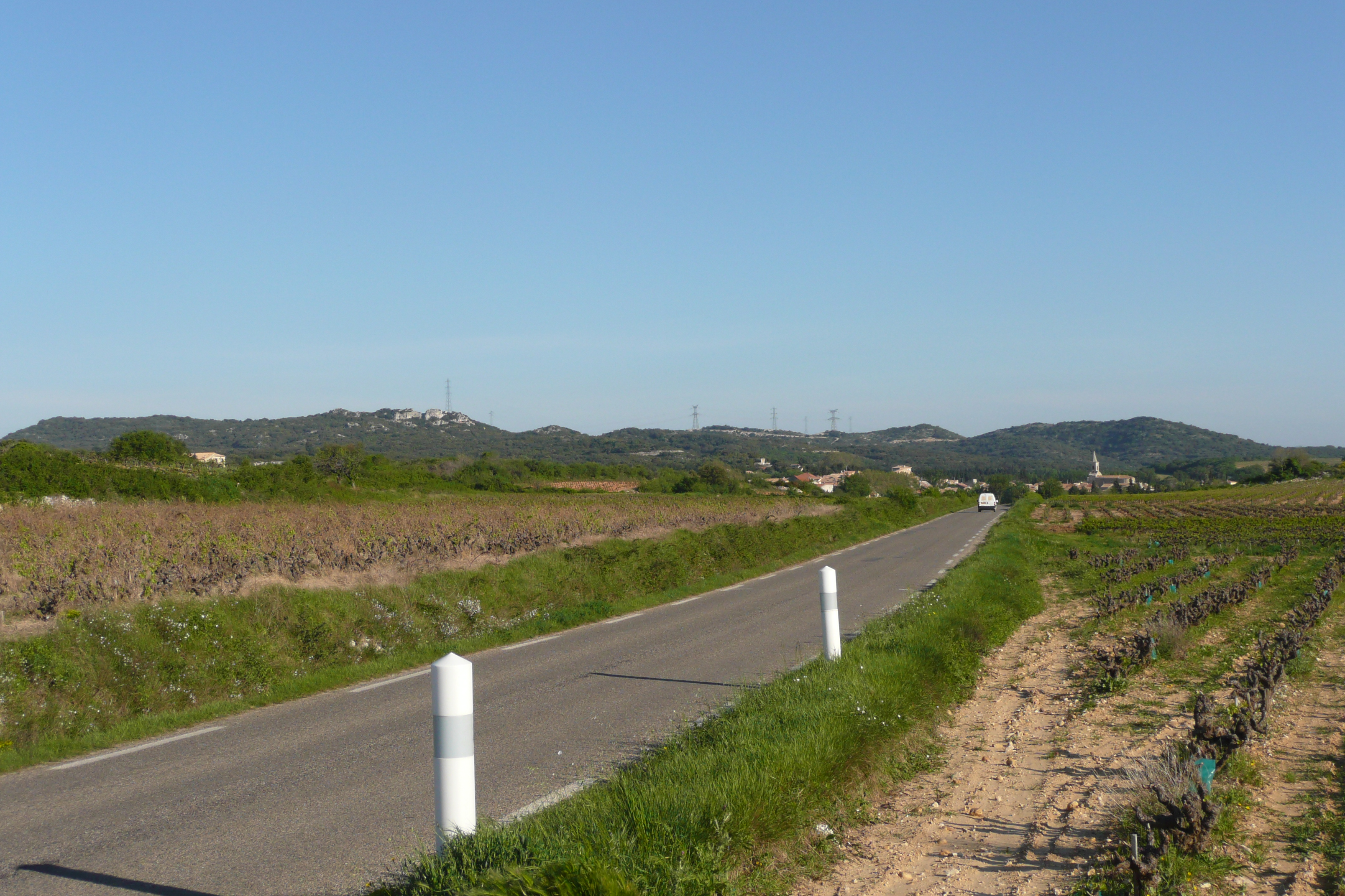 Vue sur Lirac.